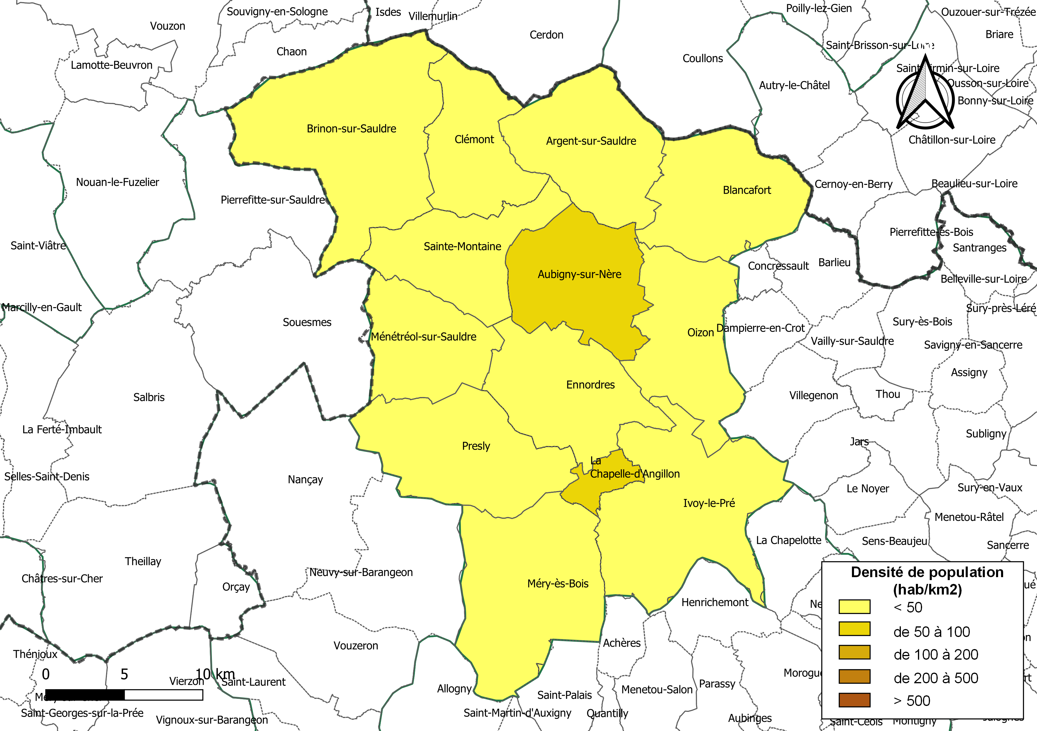 Carte géographique de la Communauté de communes Sauldre et Sologne, département du Cher, France. Composition au 1er janvier 2019.